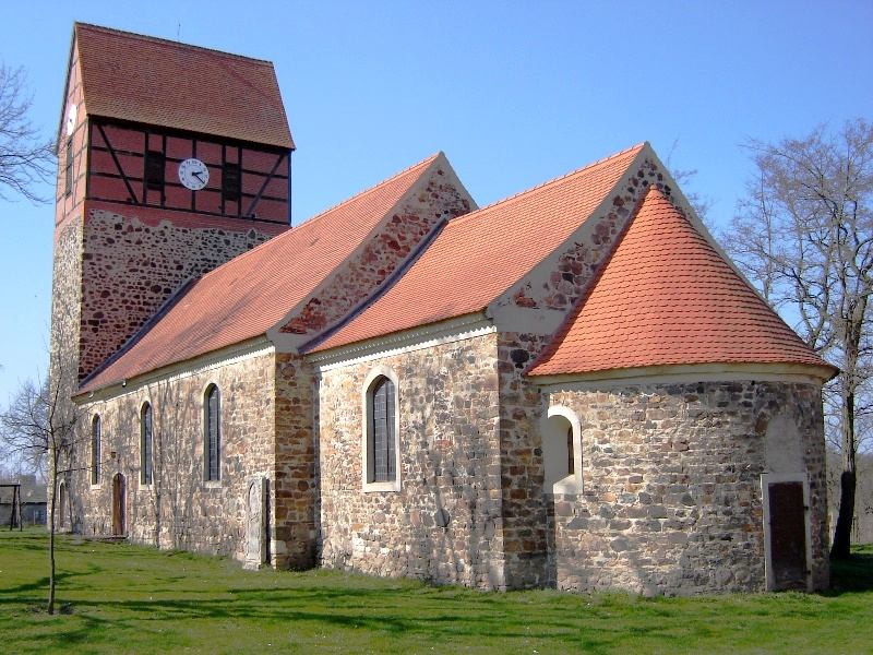 Kirche Schartau (Burg), Sachsen-Anhalt